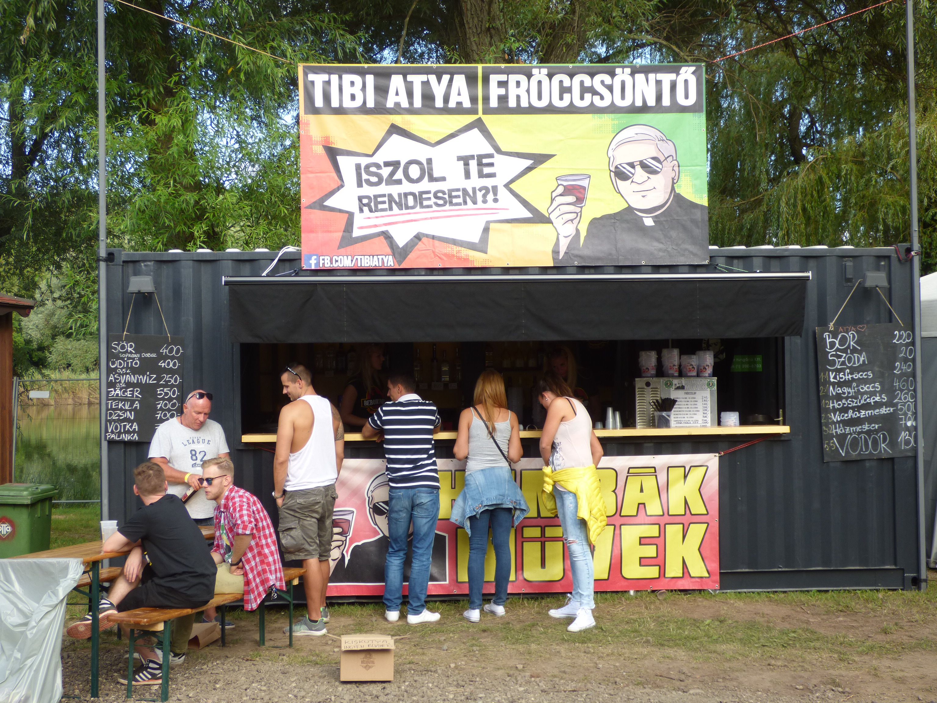 Tibi atya márkenevű "fröccsöntő" vendéglátóhely a 25. Vörösvári Napok helyszínén